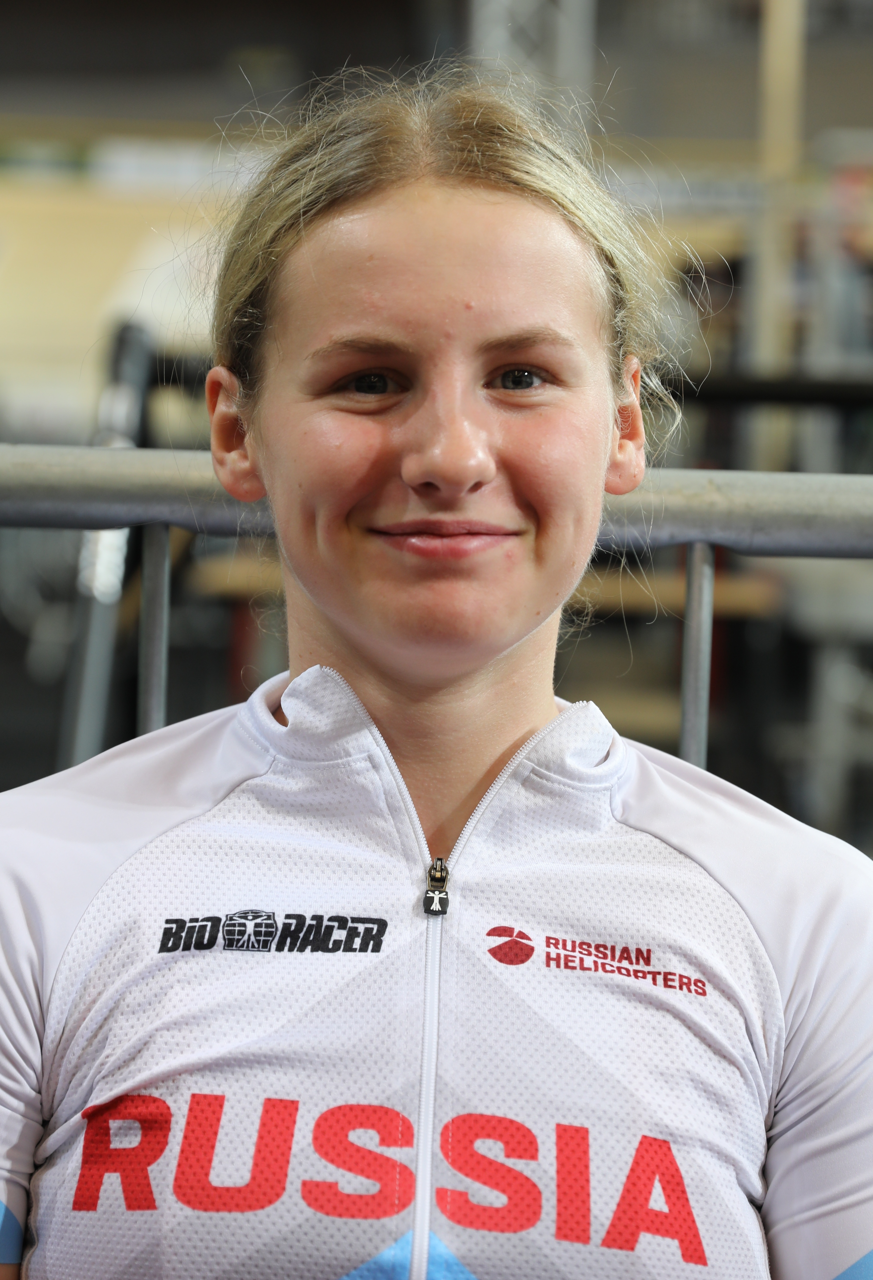 Ekaterina Rogovaya, russisische Radsportlerin